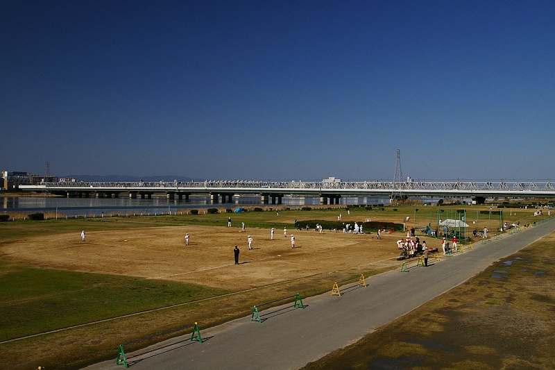 Yodogawa Kasen Park, Osaka City, Japan.